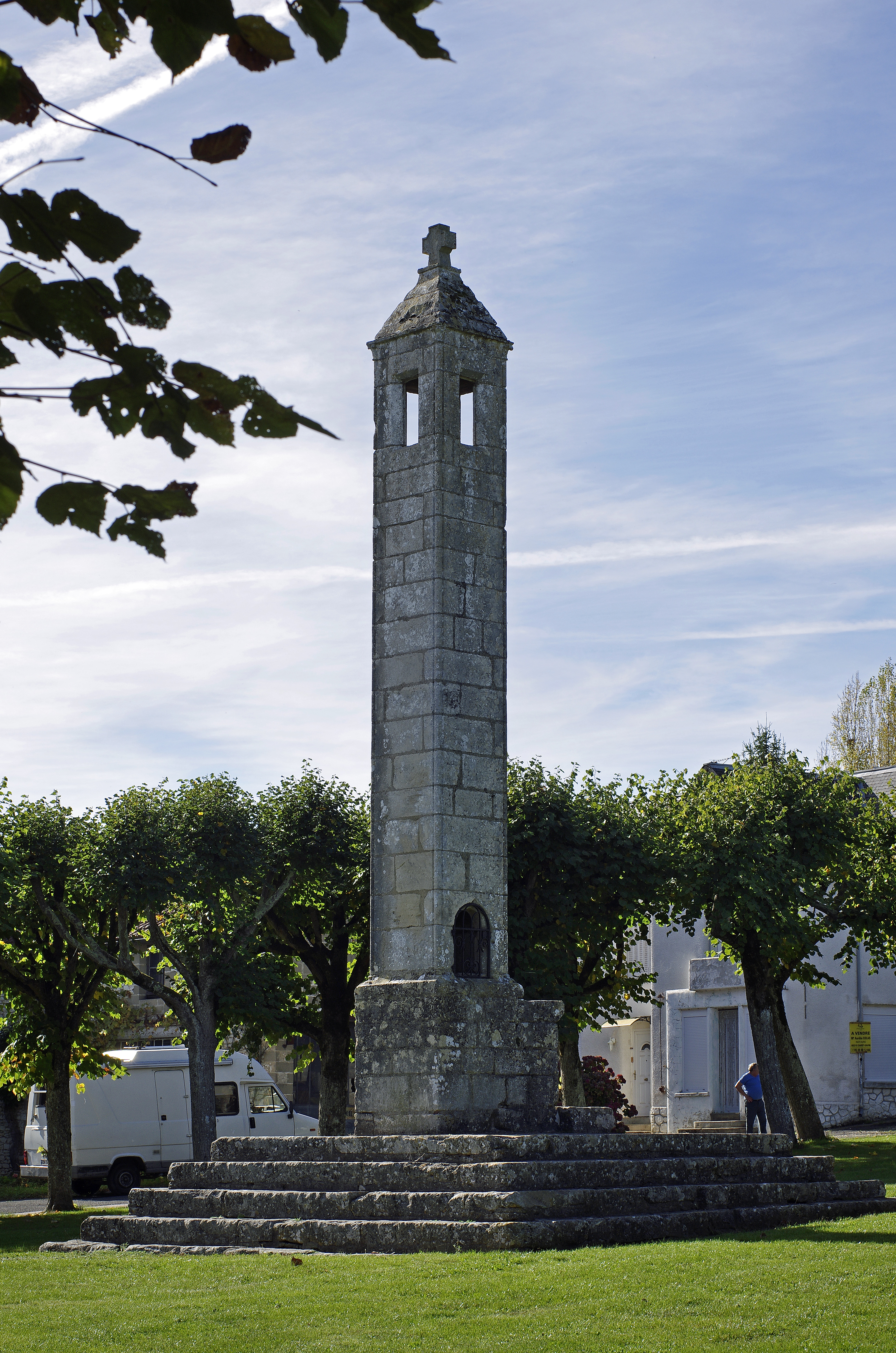 Antigny (Vienne). Lanterne des morts XIIIe siècle. Il s'agit d'un fanal creux, en pierre, érigé pour signaler la présence d'un cimetière. La lanterne des morts d'Antigny était probablement au milieu du cimetière médiéval. Les quatre faces sont orientées selon les quatre points cardinaux. Les lanternes des morts ne sont apparues en France qu’au 12ème siècle à l’époque où Pierre le Vénérable, abbé de Cluny de 1122 à 1156, nous en donnait une description :« ce qui occupe le milieu du cimetière, c’est une construction en pierre. Elle comporte en son sommet une cavité pouvant contenir une lampe qui, en l’honneur des fidèles qui reposent là, éclaire toutes les nuits ce lieu consacré. Il y a aussi des degrés par lequel on monte sur un espace suffisant pour que deux ou trois hommes se tiennent debout ou assis ». (Pierre le Vénérable, De miraculis). Les lanternes des morts servaient à protéger, dit-on, les morts du diable et les vivants des revenants...